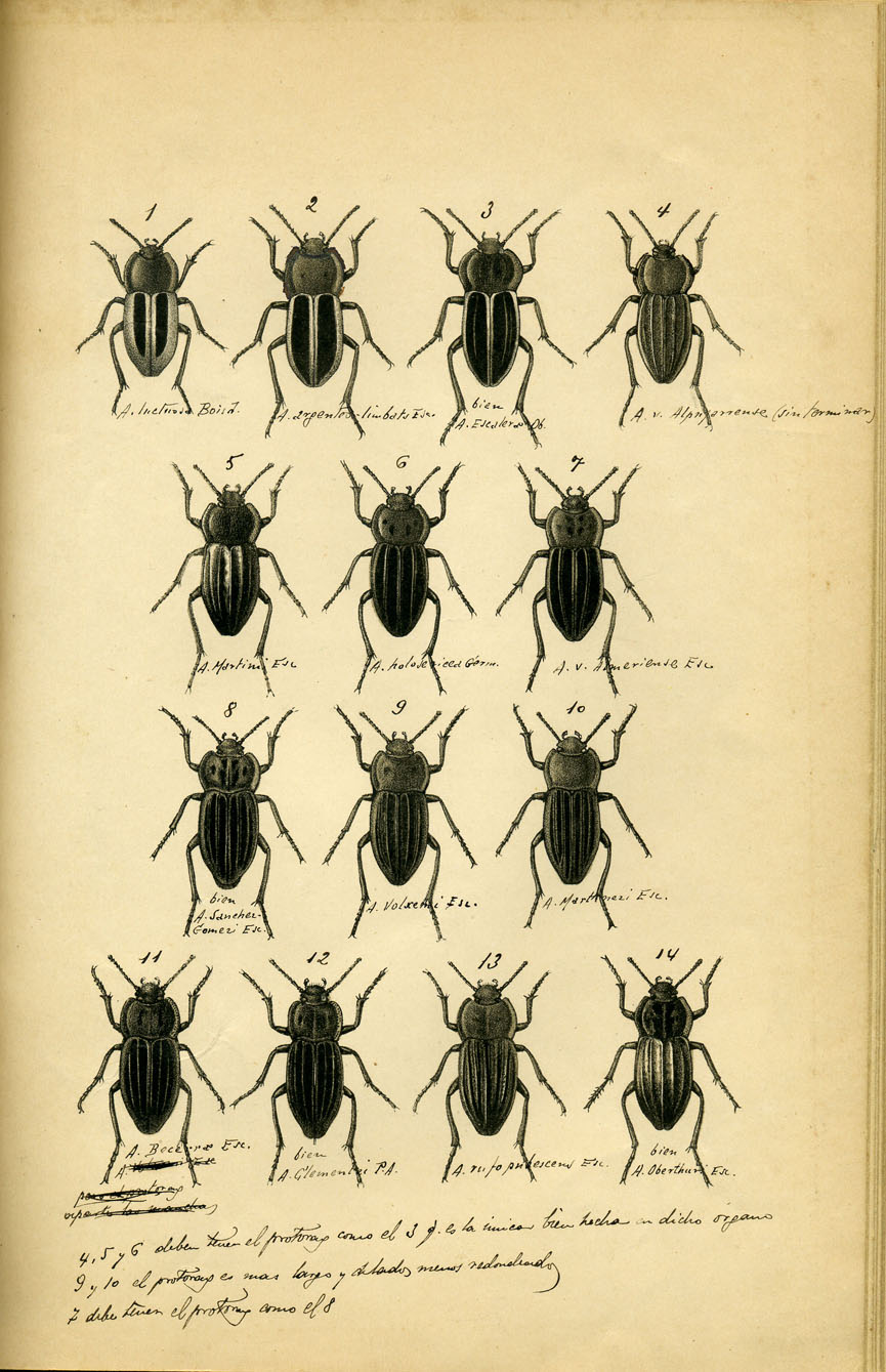 Dibujos de especies del género Asida (Coleoptera: Tenebrionidae). Lámina inédita con anotaciones manuscritas de M. de la Escalera.